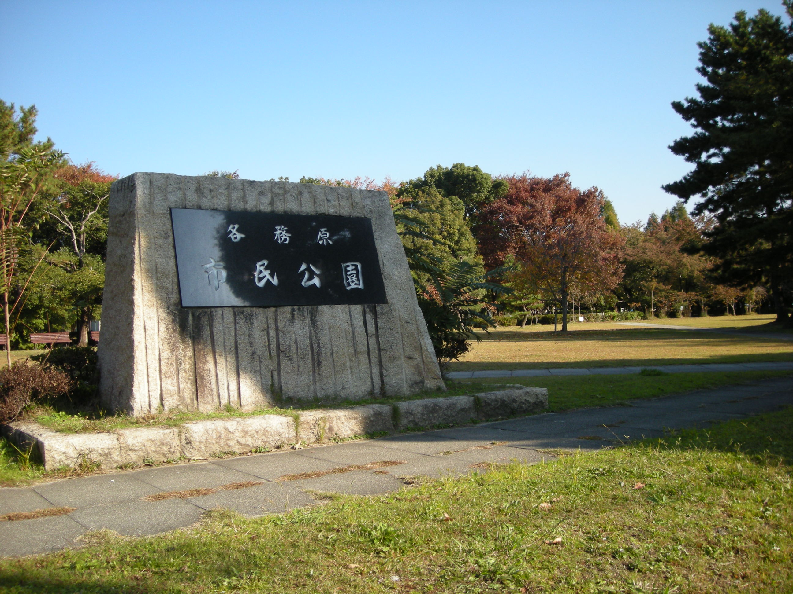 kakamigahara public park（各務原市民公園）